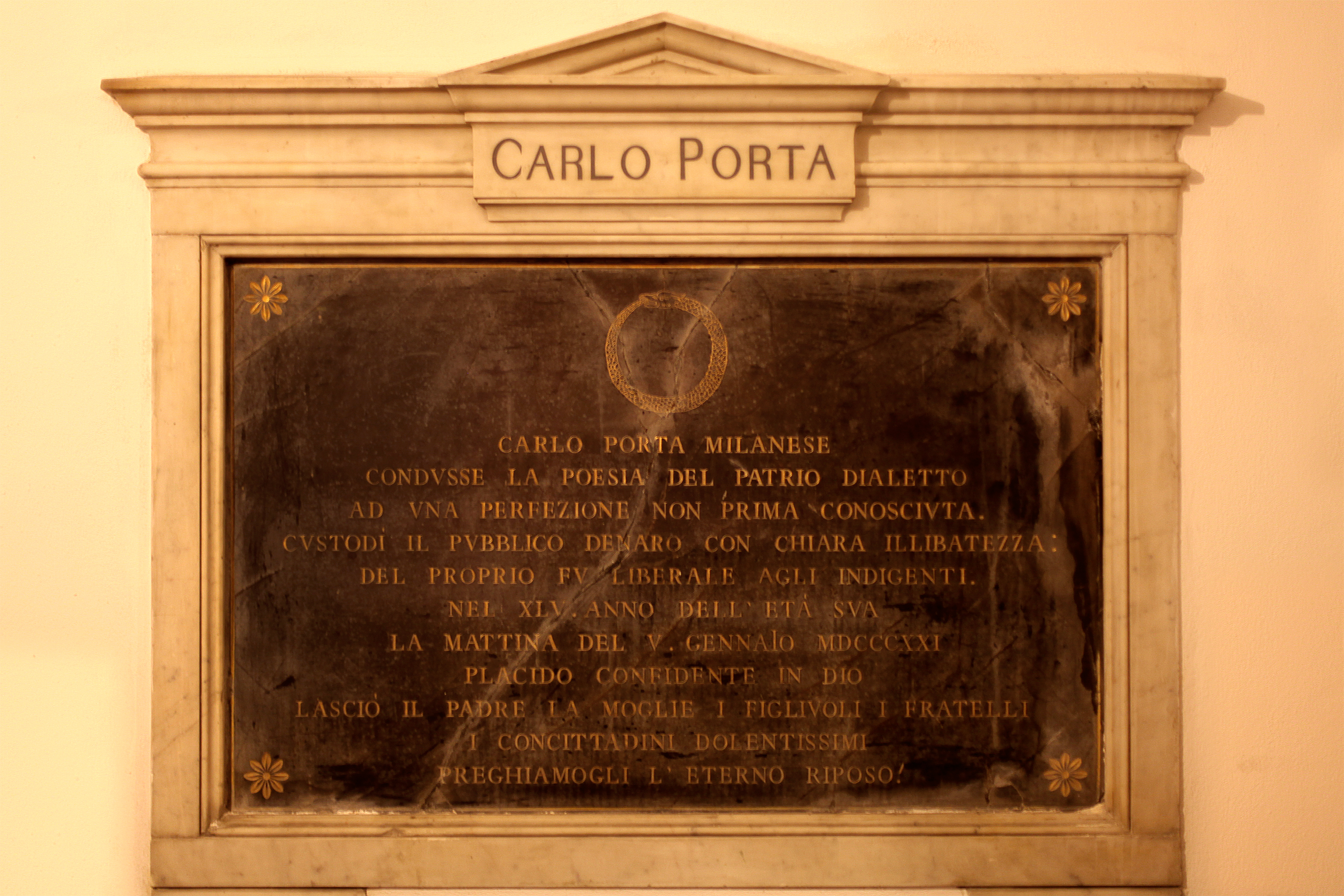 Lapide funeraria di Carlo Porta, originariamente al cimitero di San Gregorio, Milano, oggi conservata nella cripta della chiesa di San Gregorio a Milano